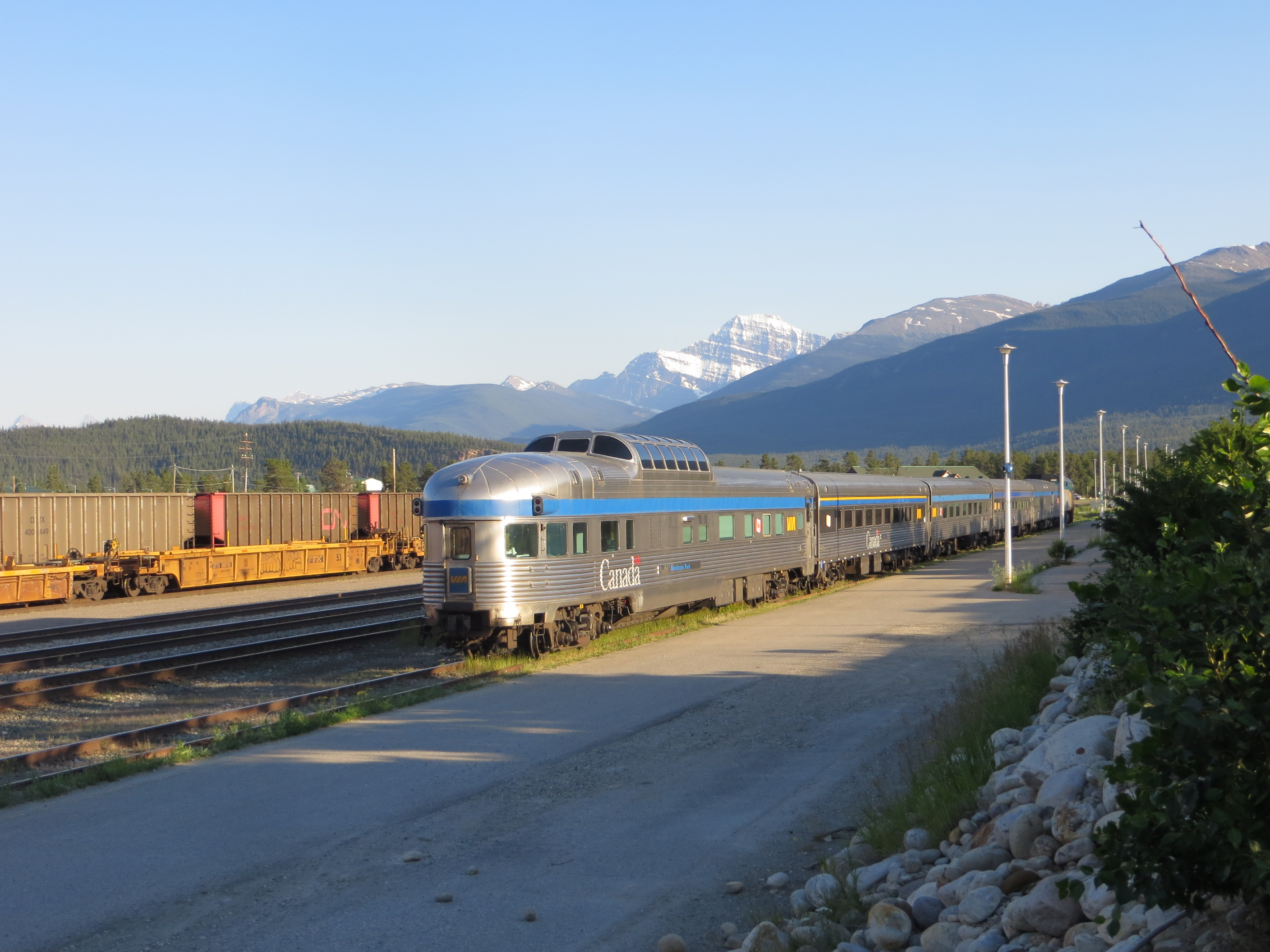 20130701 79 VIA, Jasper, Alberta